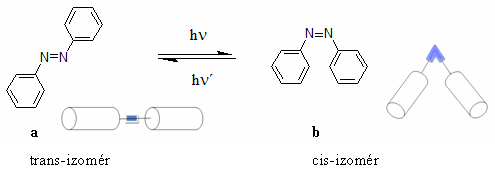 Fotoizomerizácia azobenzénu